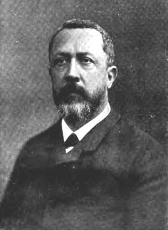 "M. Sauton, Président du Conseil municipal [de Paris] en 1892 et en 1897. Cliché de Marius."